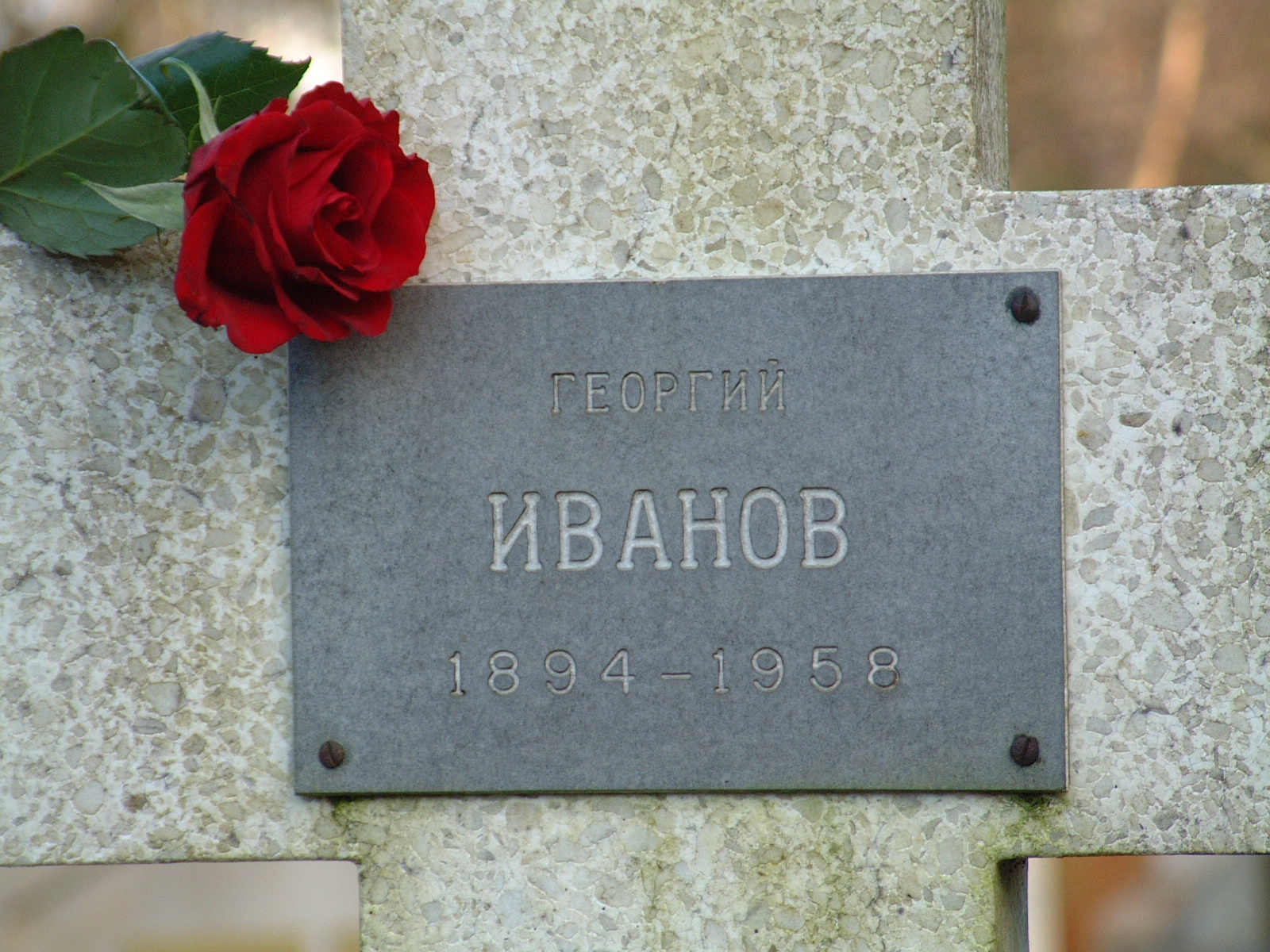 Georgij Ivanov. Inschrifttafel am Grabkreuz auf dem russische Friedhof von Sainte-Geneviève-des-Bois